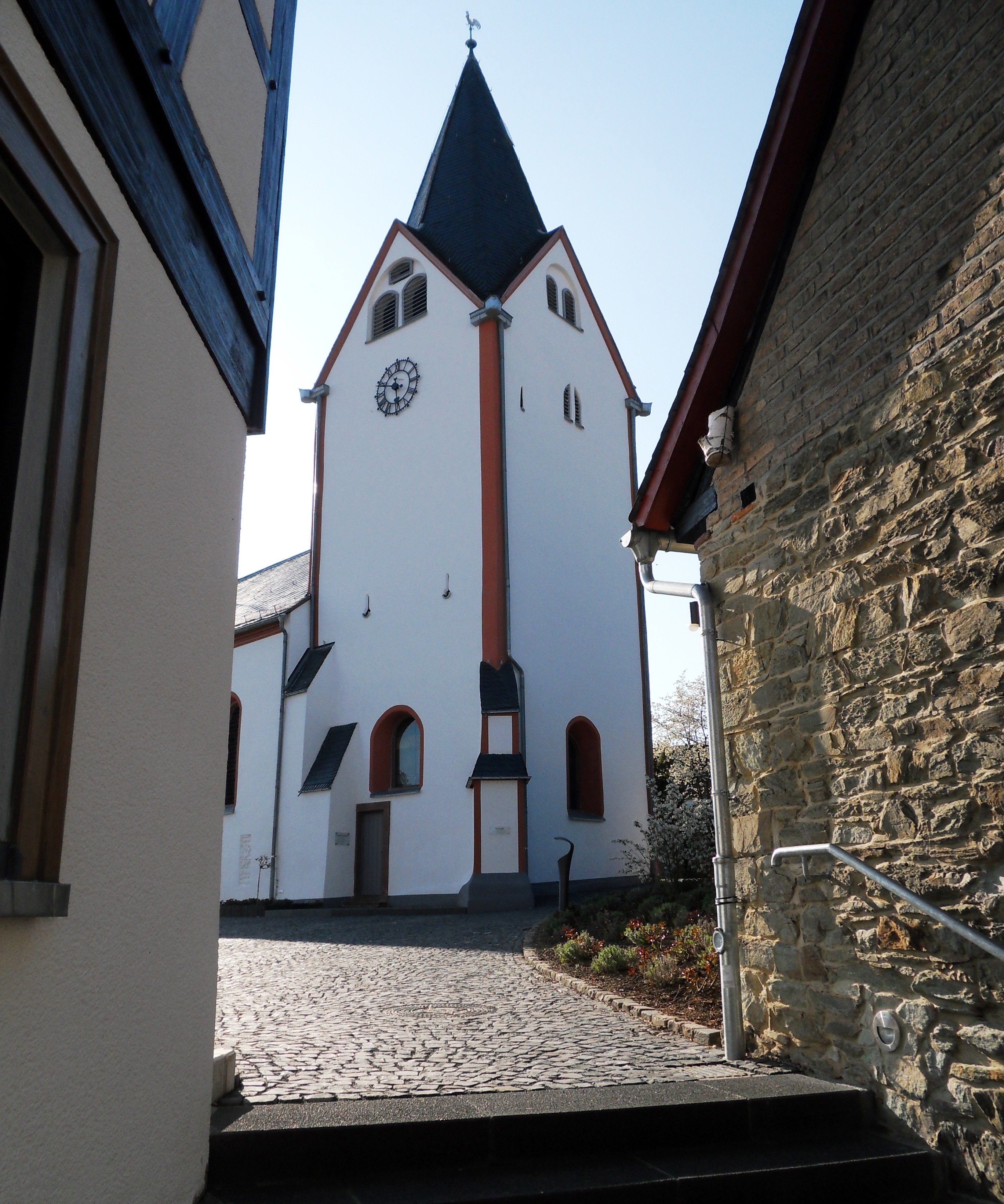 Evangelische Kirche in Wiesbaden-Kloppenheim, Blick von der Oberstraße im Osten auf den Kirchturm